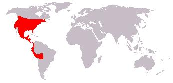 Bewerking afbeelding: Afbeelding_(kaart).JPG